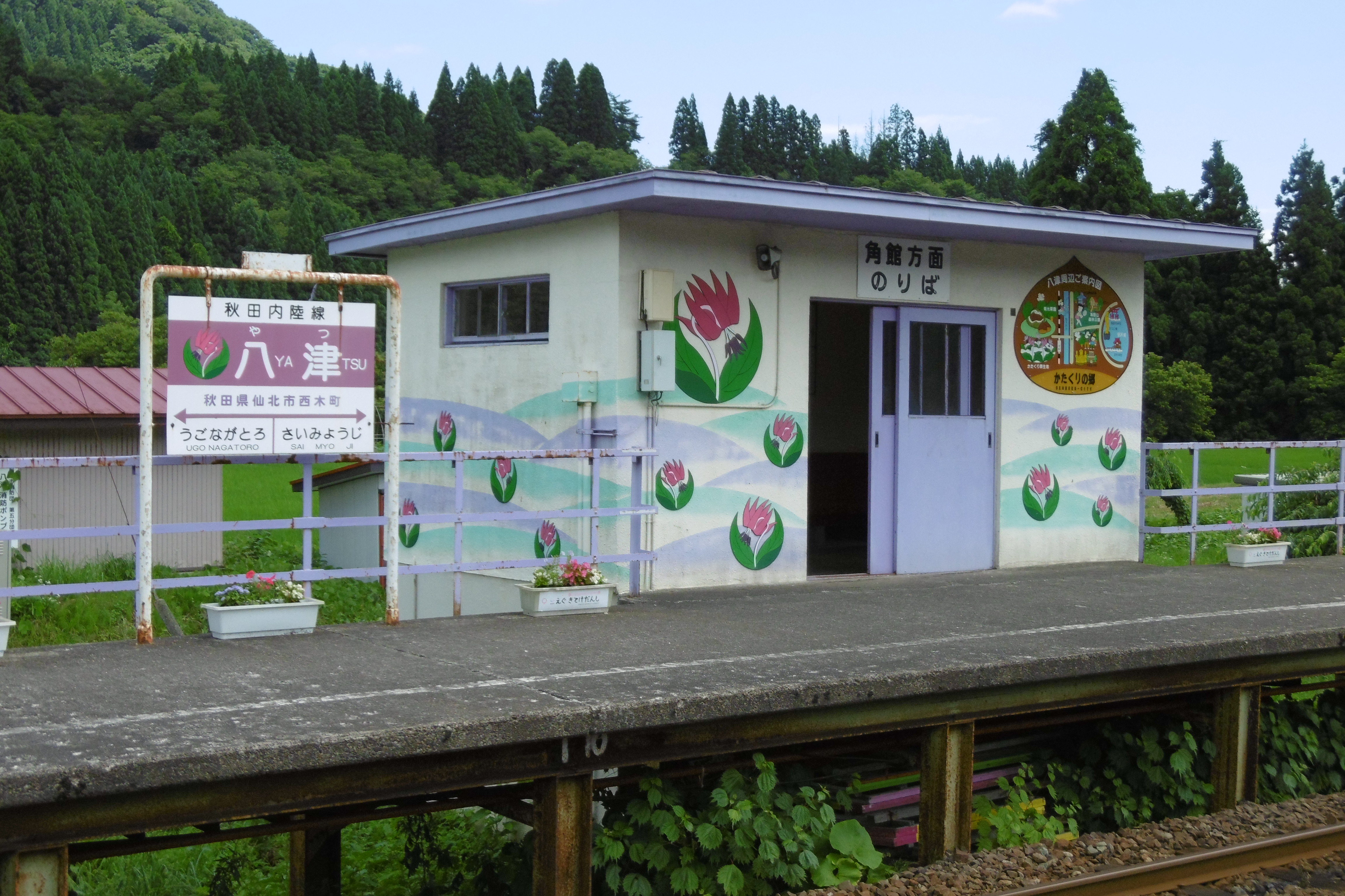 秋田内陸縦貫鉄道・八津駅下りホーム：秋田県仙北市西木町